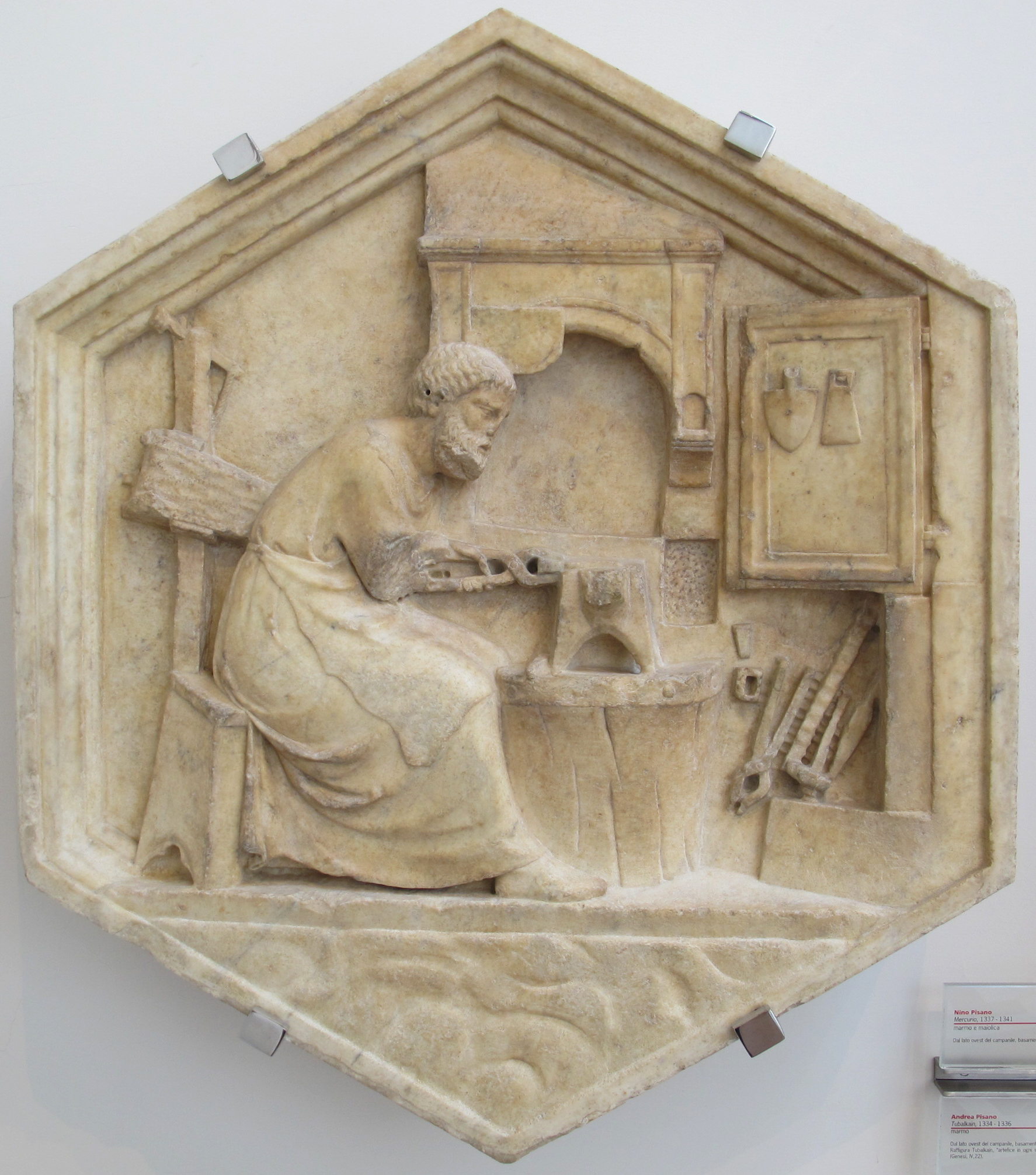 Andrea pisano, tubalkain, 1334-36